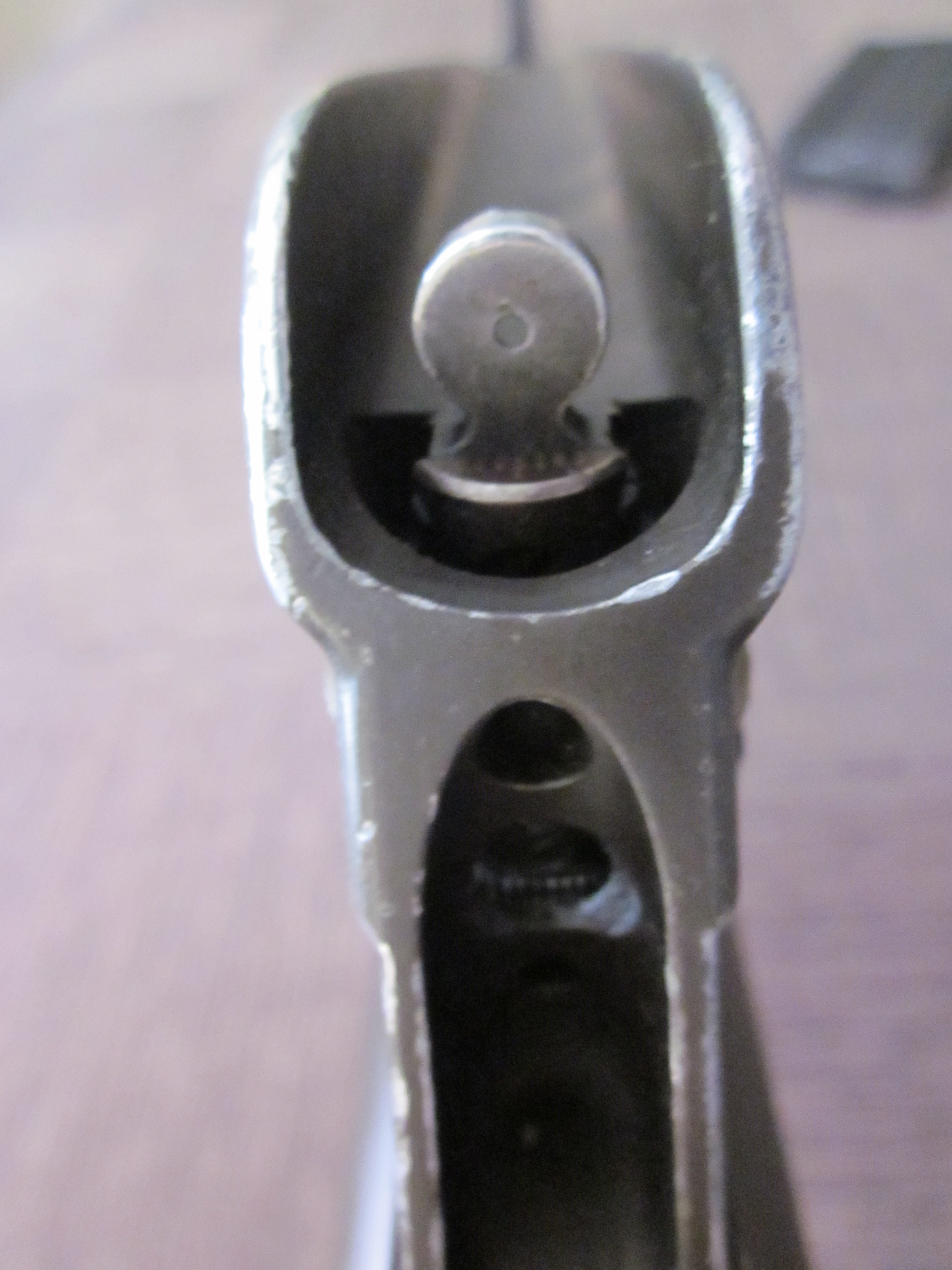 photo AR10